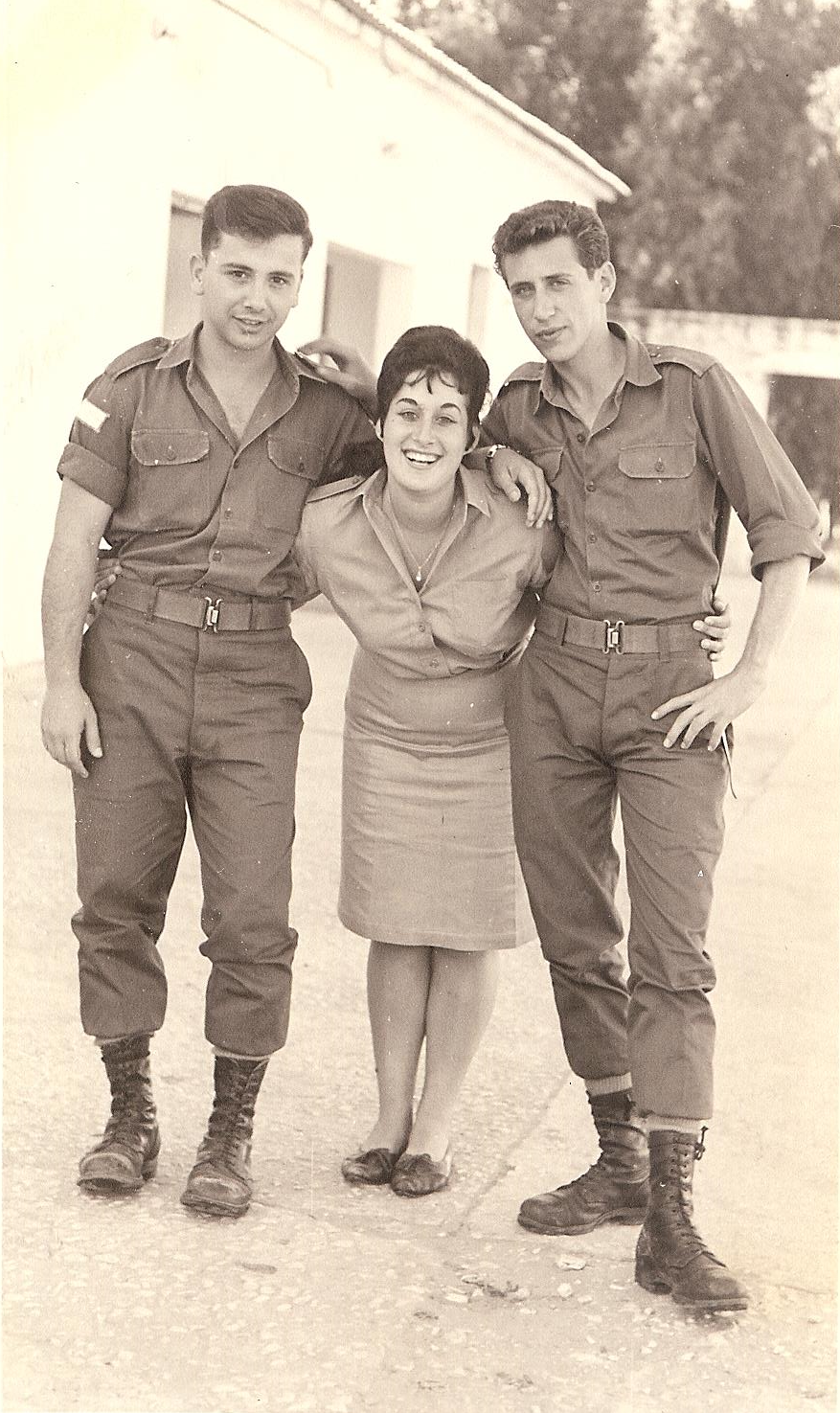 הלל שמיד בעת שירותו בנחל